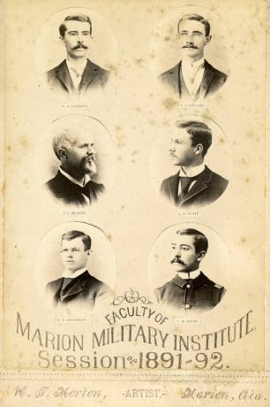 马里昂军事学院教员1891-1892